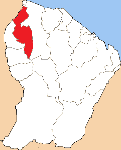 Situation du canton dans le département de la Guyane